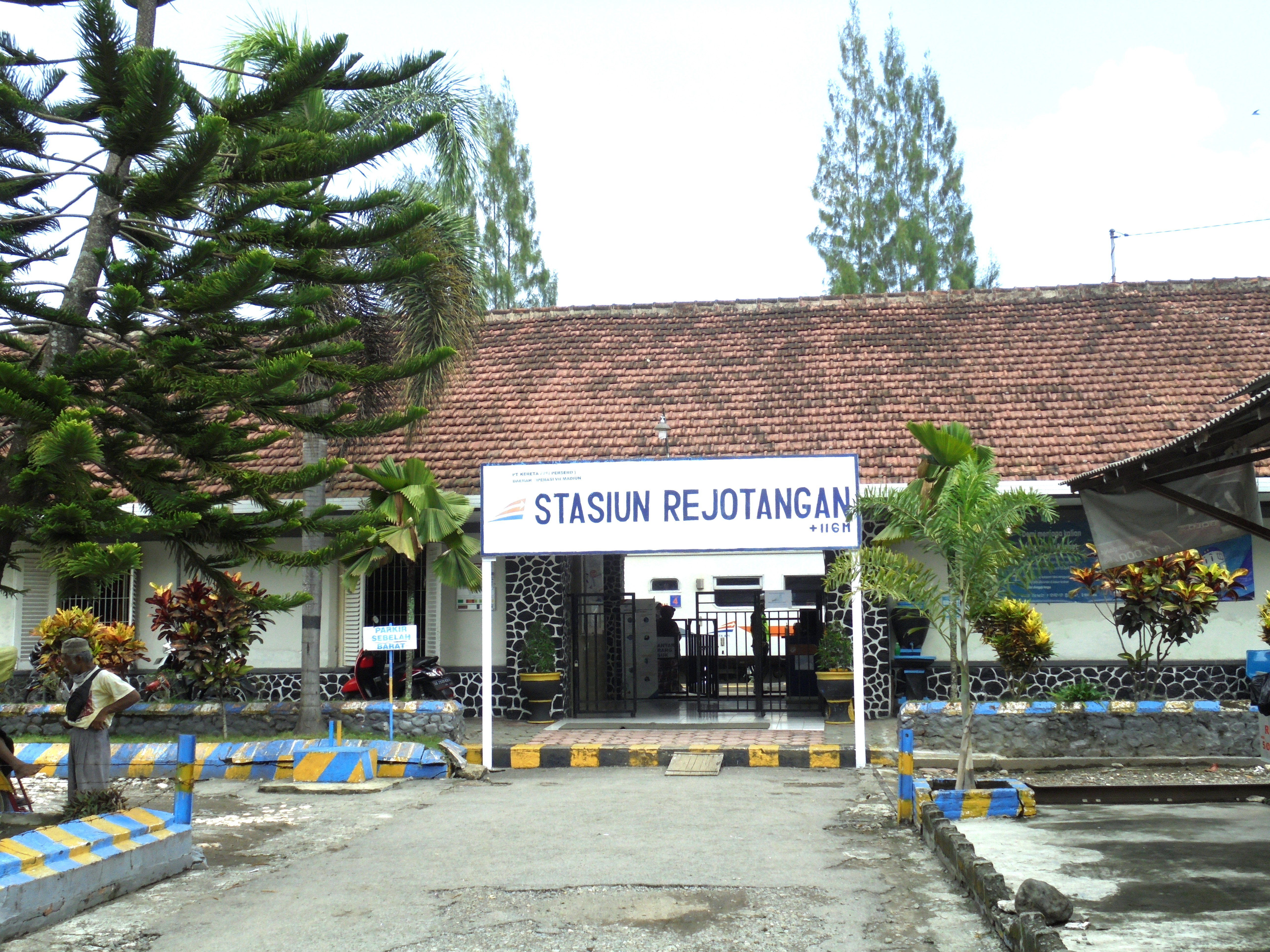 Tampak depan Stasiun Rejotangan pada tahun 2020